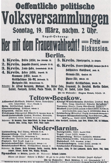 Veranstaltungsankündigungen der SPD zur Forderung nach dem Frauenwahlrecht